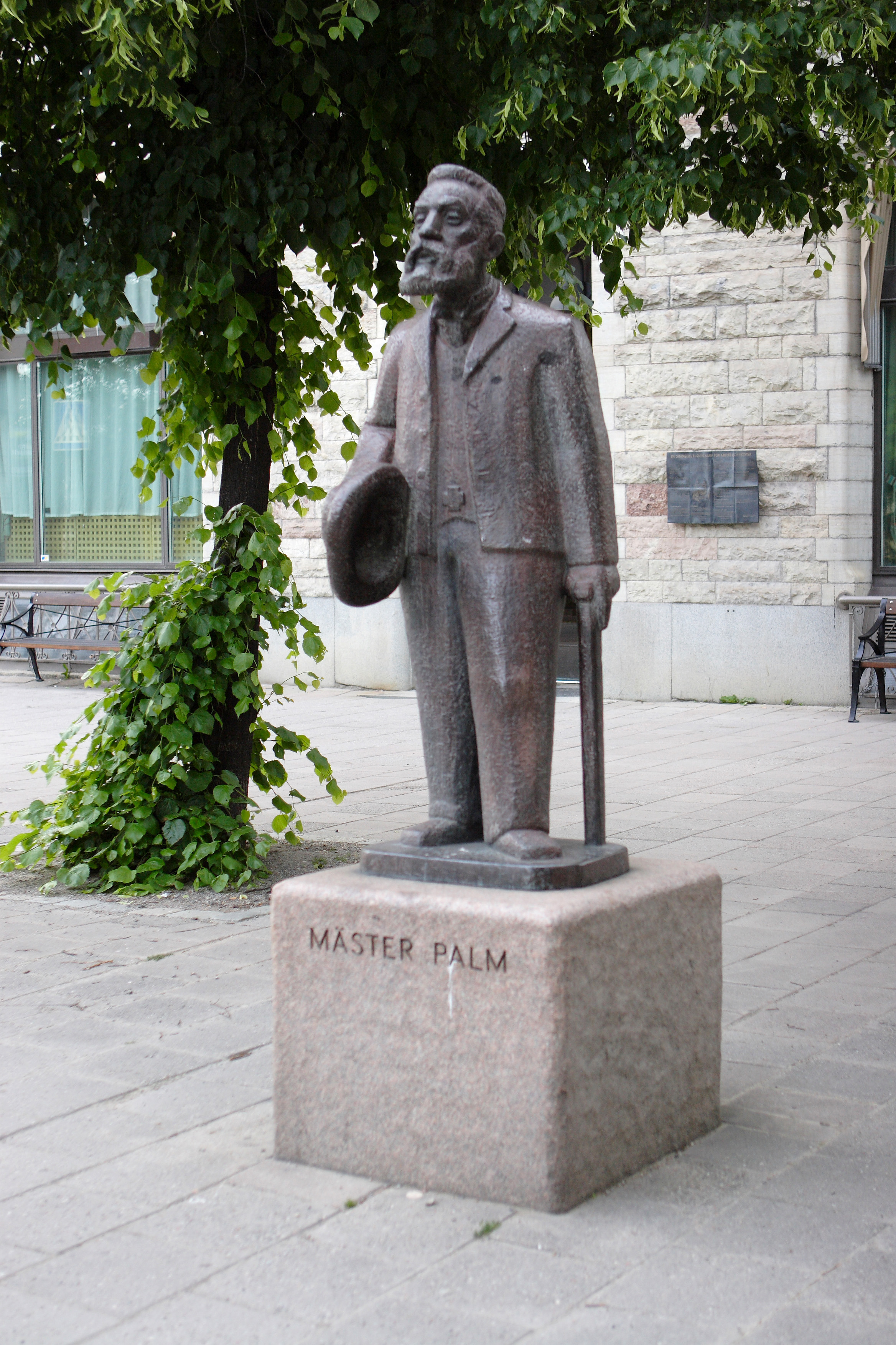 Mäster August Palm statue at Norra bantorget, Stockholm